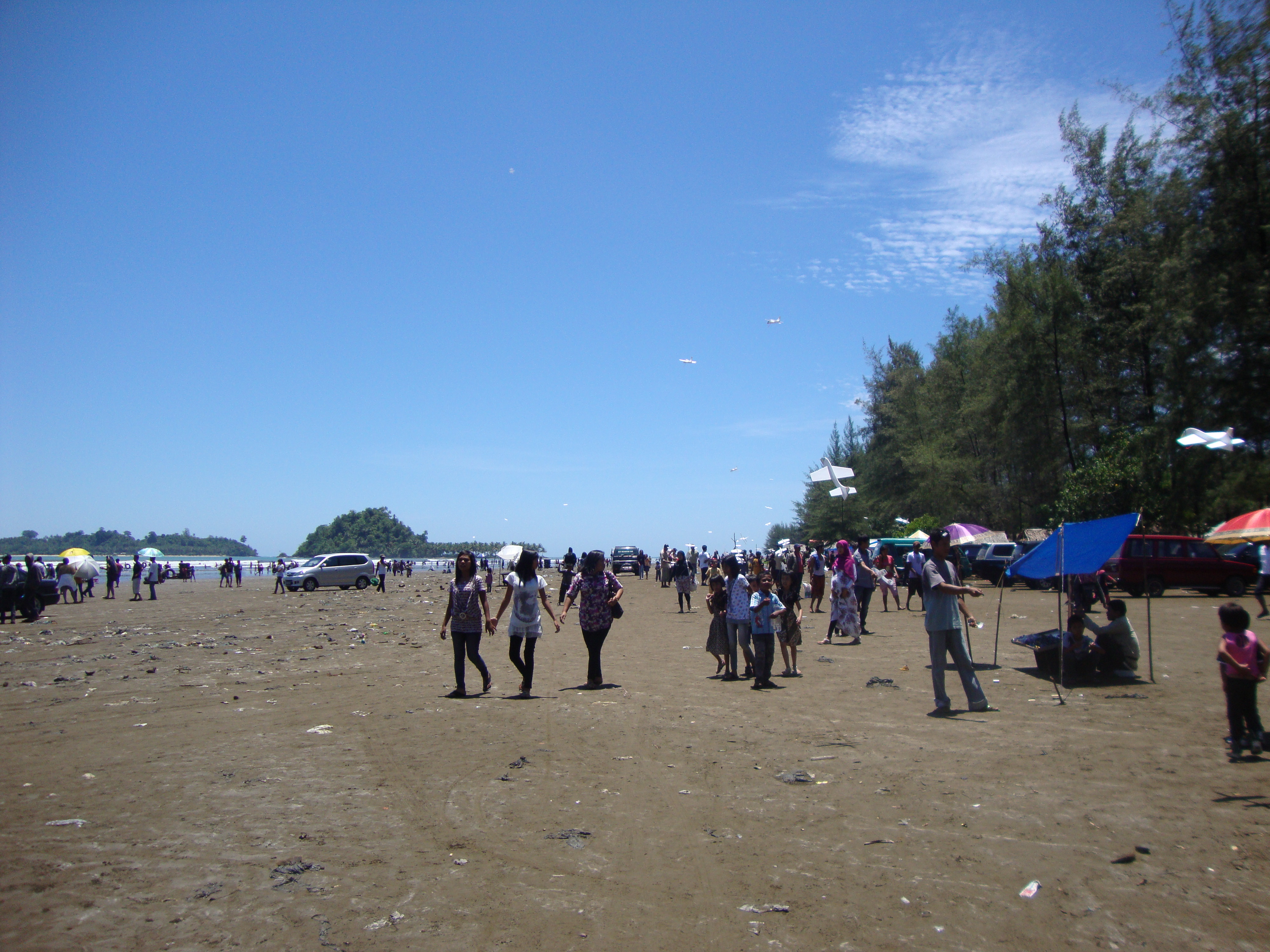 Pantai Air Manis